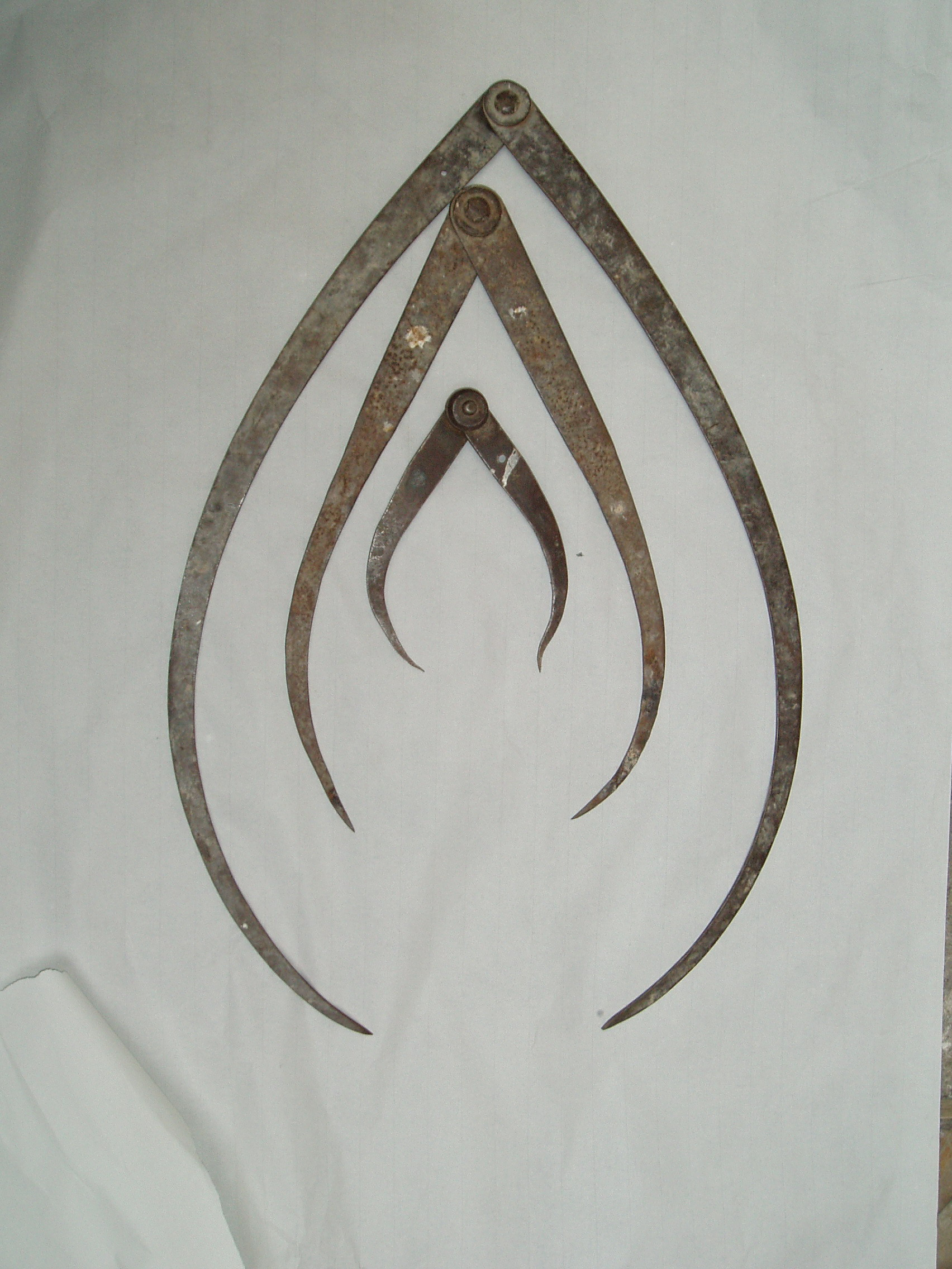 KAmenické nástoje kružidla